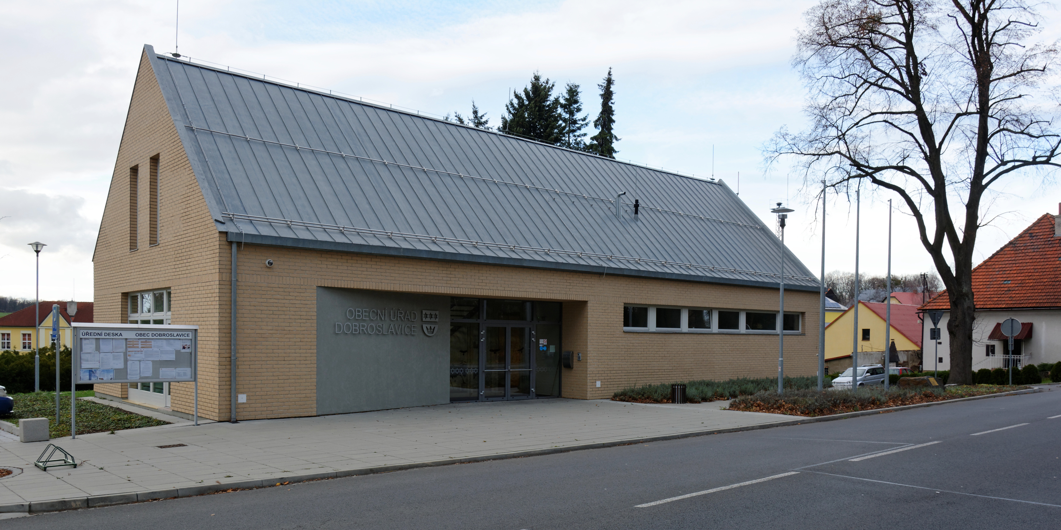 Dobroslavice, obecní úřad, architekt:STUDIO-D Lubomír Dehner, Ondřej Kubesa, postaveno 2013